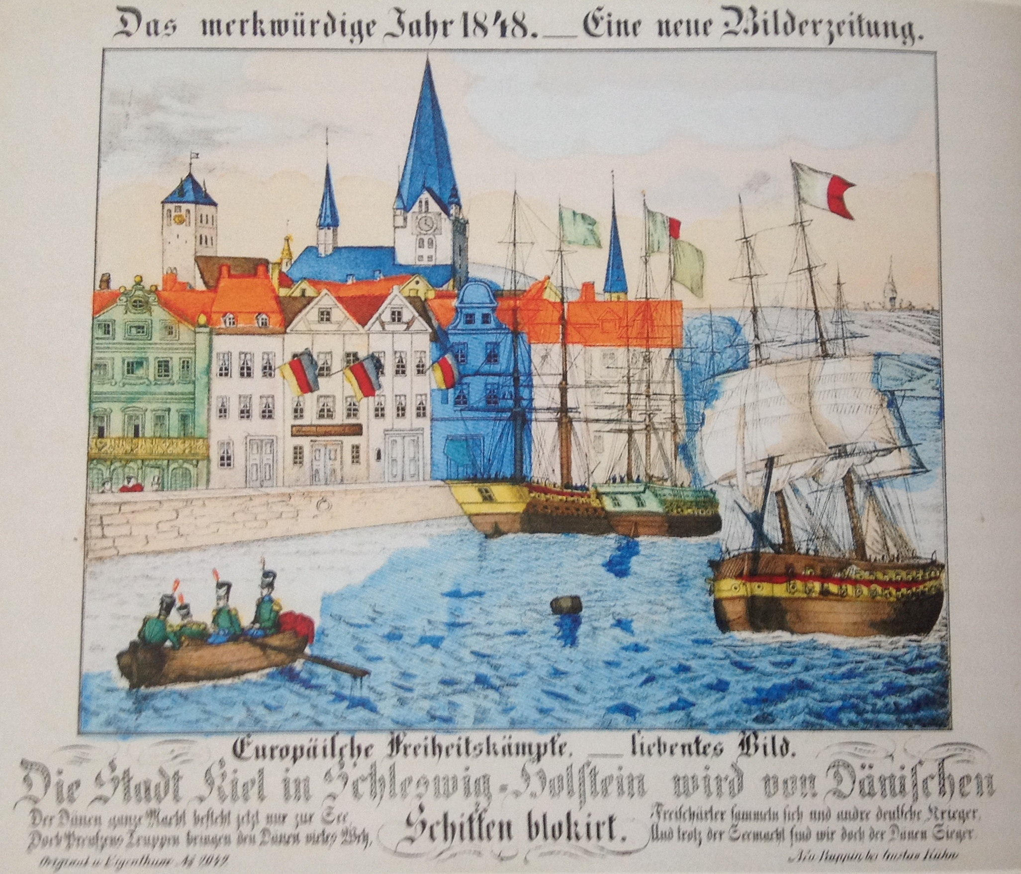 “Das merkwürdige Jahr 1848. Eine neue Bilderzeitung. Europäische Freiheitskämpfe. Siebentes Bild. Die Stadt Kiel in Schleswig-Holstein wird von Dänischen Schiffen blokiert.”